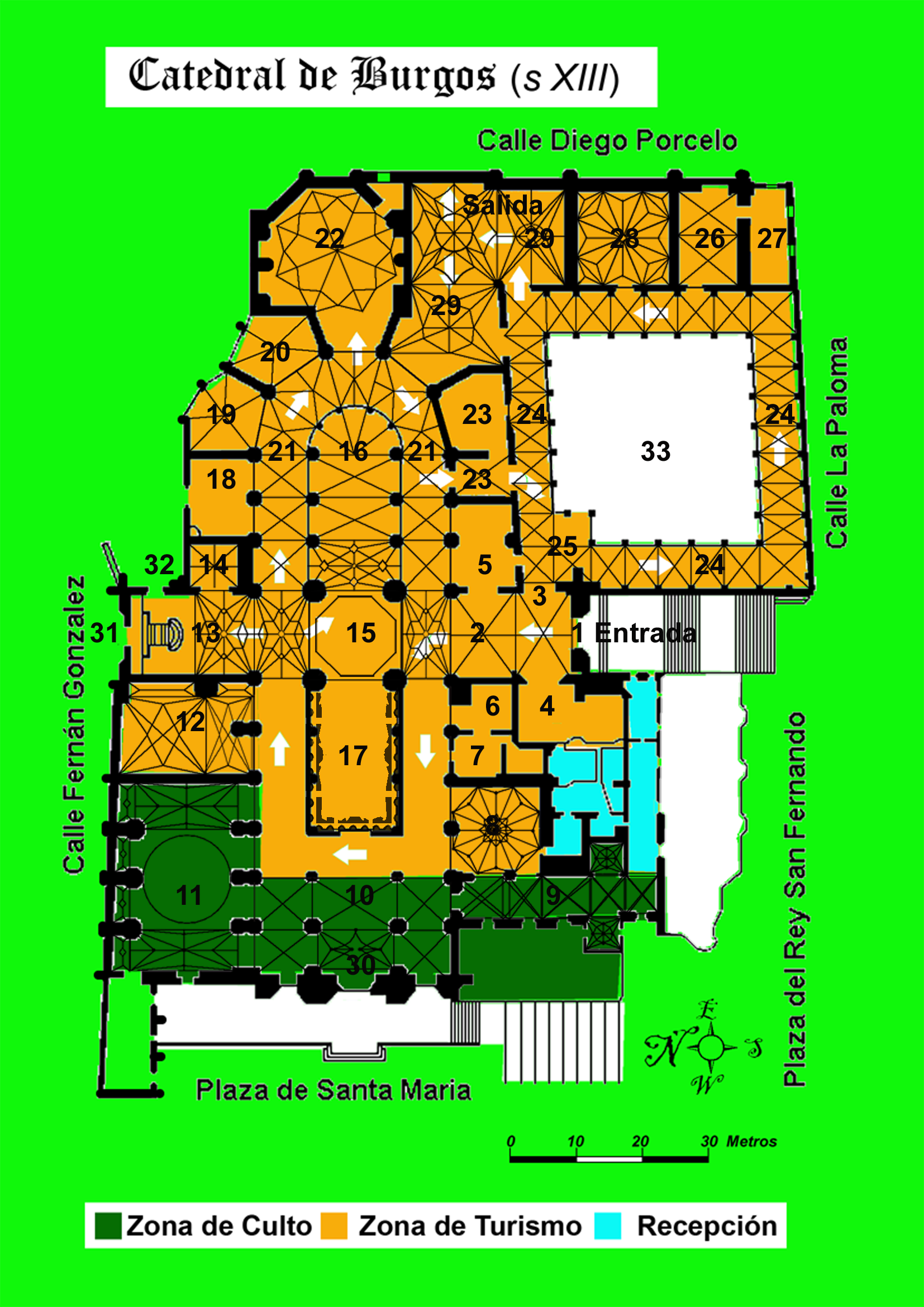 Planta, Catedral de Burgos, España, siglo XIII; basada en imagen de wiki.de, ver: Other_versions